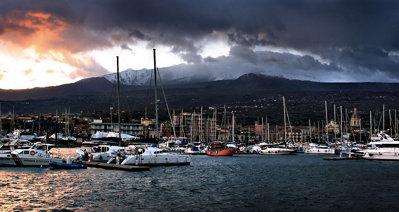 La cittadina di Riposto, in provincia di Catania, Sicilia, Italia.